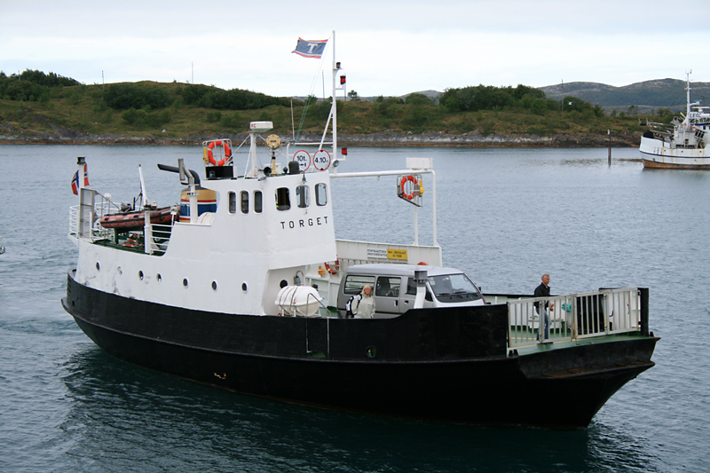 Ferry «Torget», Brønnøysund, Norway.